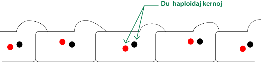 dukernaj hifo